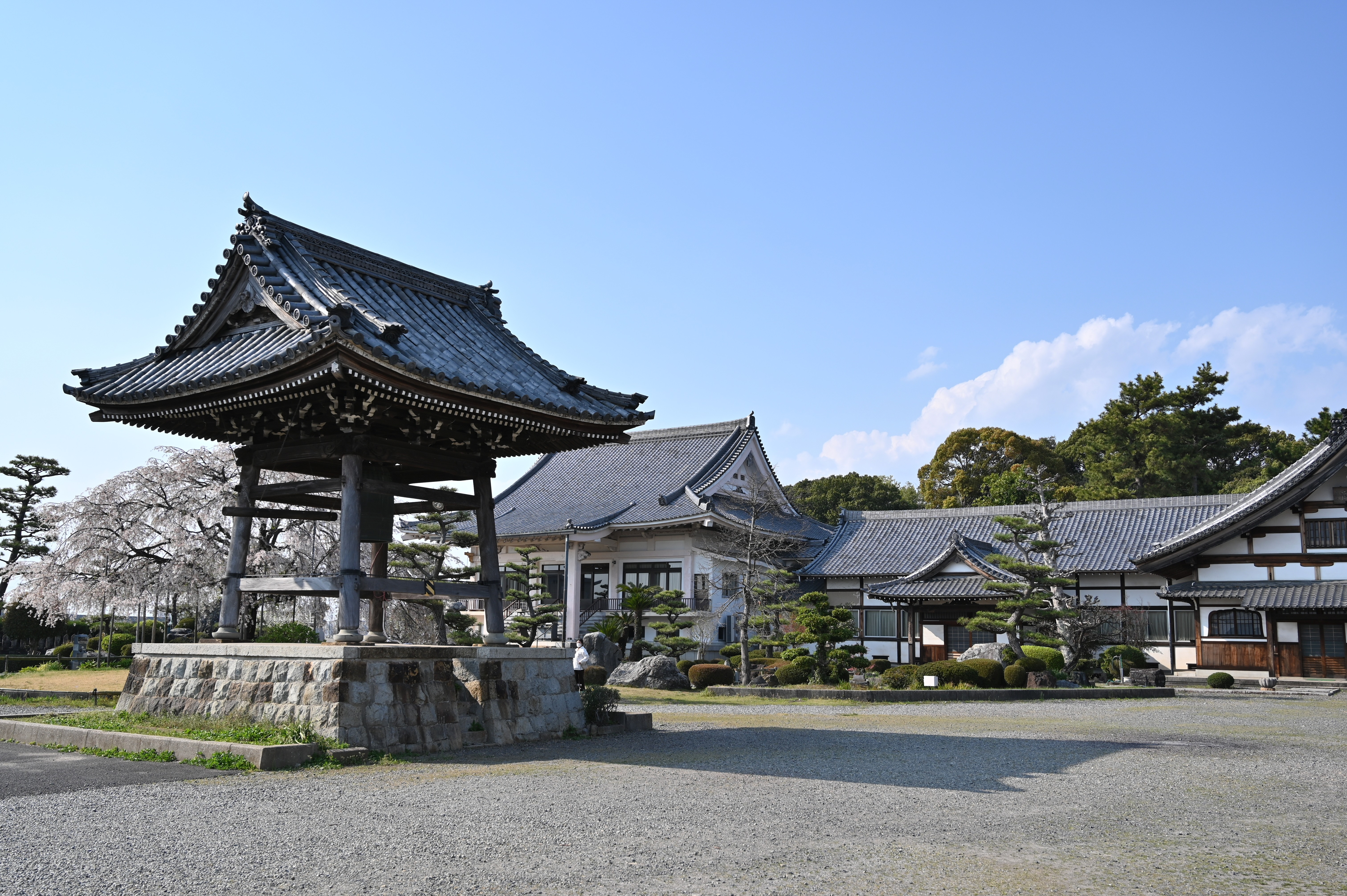 正眼寺の境内